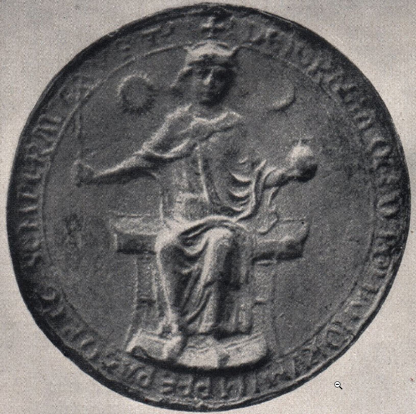 Seal Otto IV.